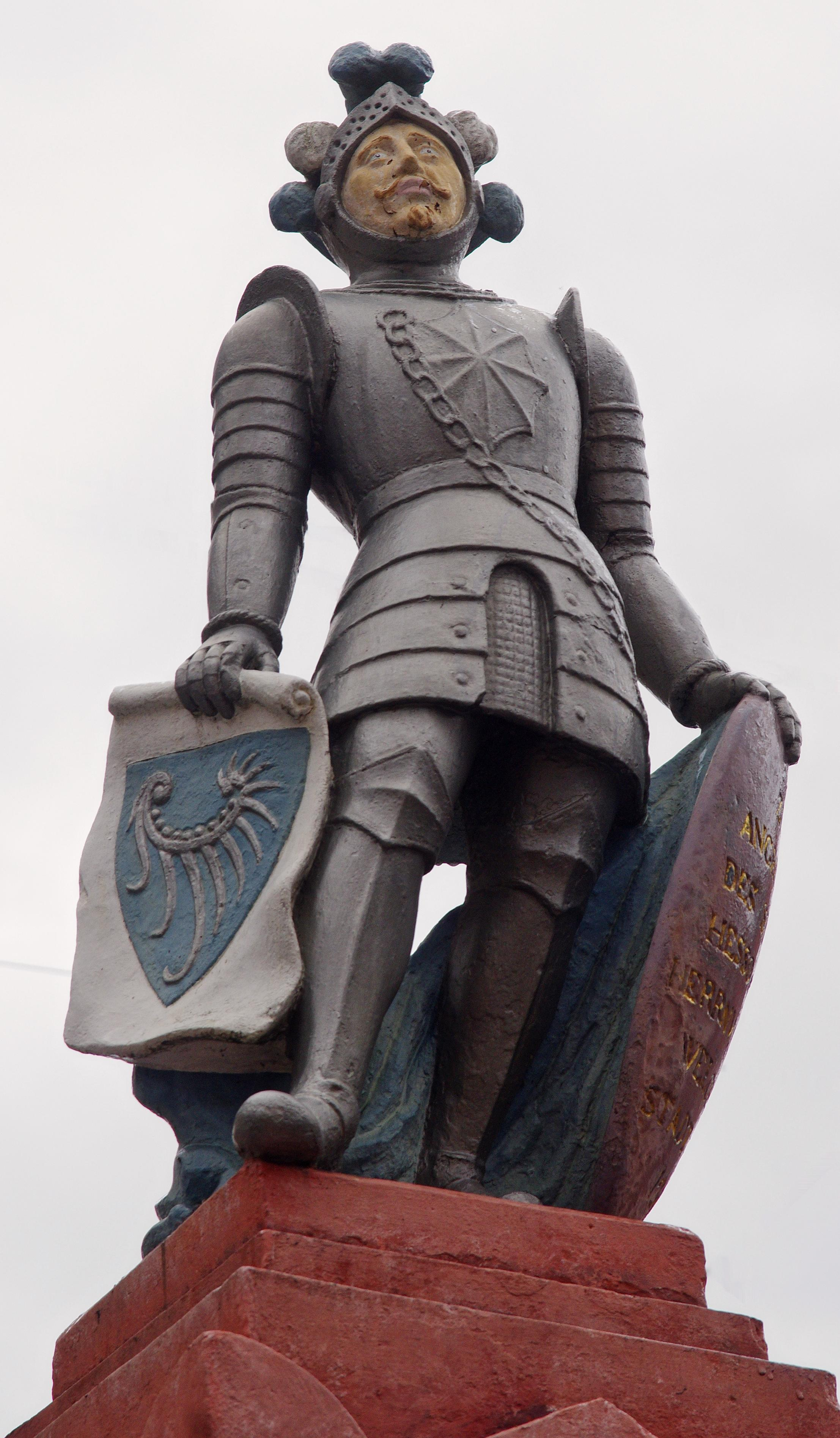 Der Üsenbergbrunnen in Kenzingen zur Erinnerung an Hesso - Rudolf den Stadtbegründer Figur auf der Spitze